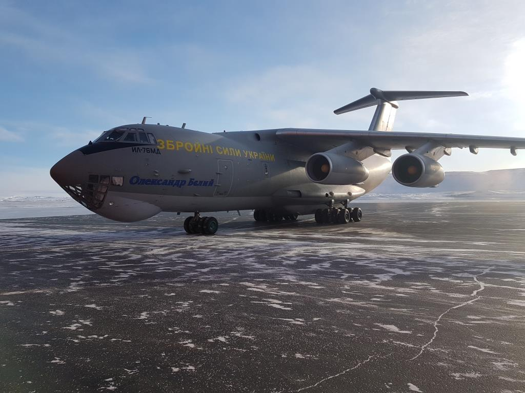 Операція «Північний сокіл-2019» тривала з 14 березня по 18 квітня. Впродовж місяця українські військові льотчики провели в полярному небі понад сто годин. А це 44 польоти з авіабази ВПС США «Туле» до данської полярної станції «Норд» та у зворотному напрямку. Українці перевезли понад 600 тисяч літрів пального і майже 50 тонн іншого вантажу.